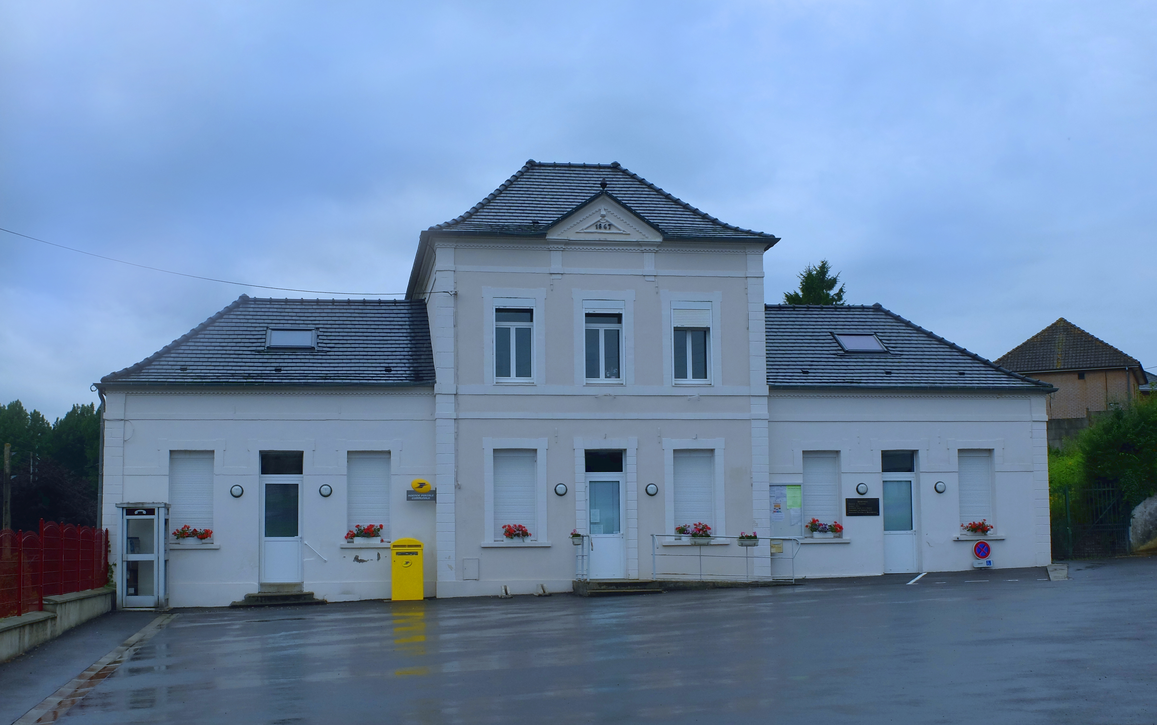 Vue de la mairie de Fillièvres.